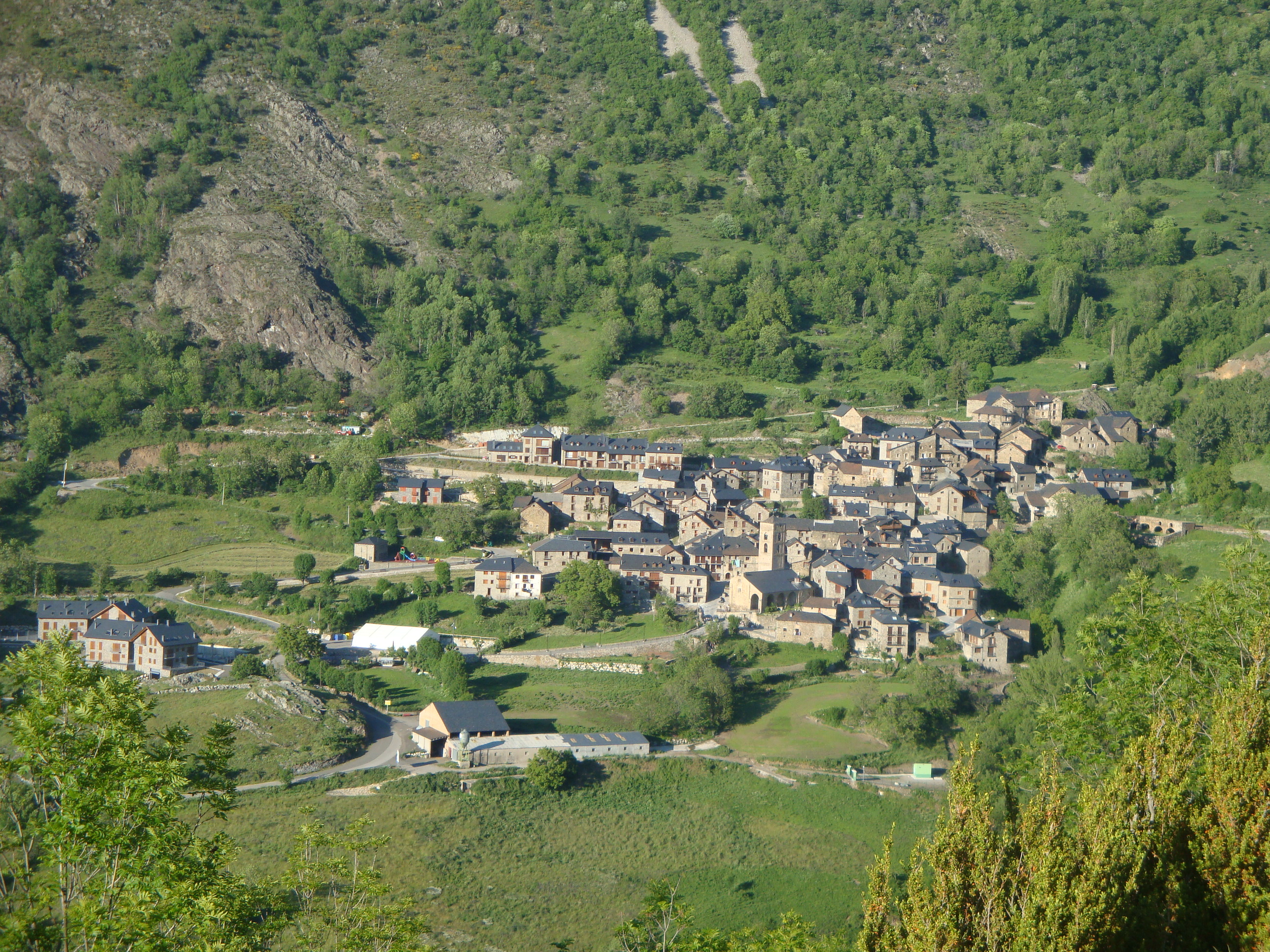 Vista general de Durro(Lleida)